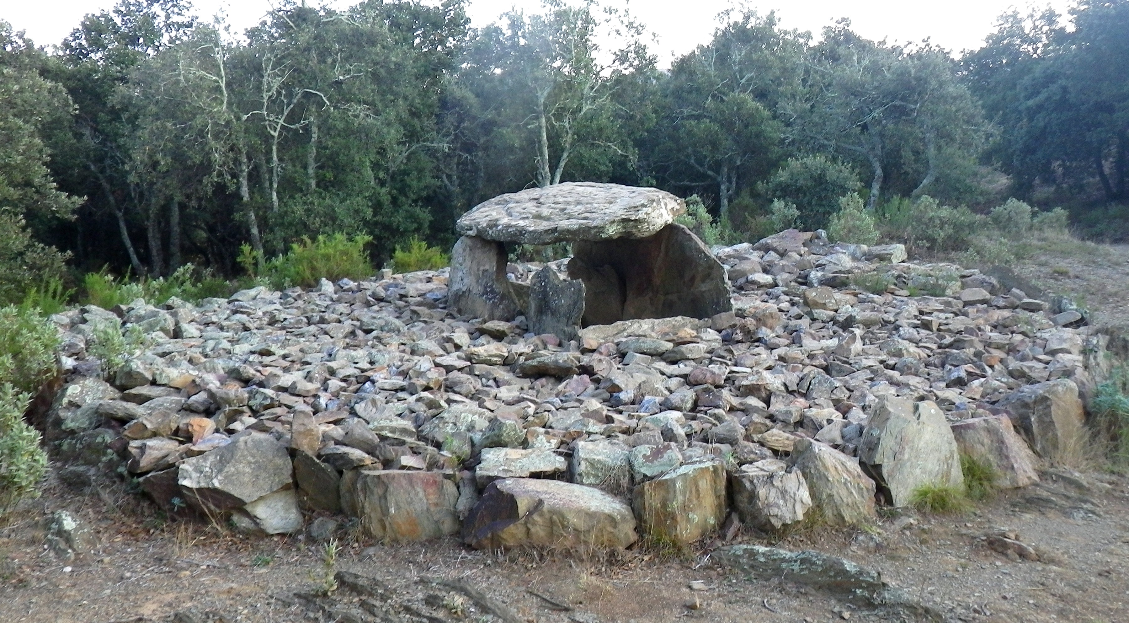 Dolmen de la creu de la Falibe à Saint- Michel de Llotes (66), France